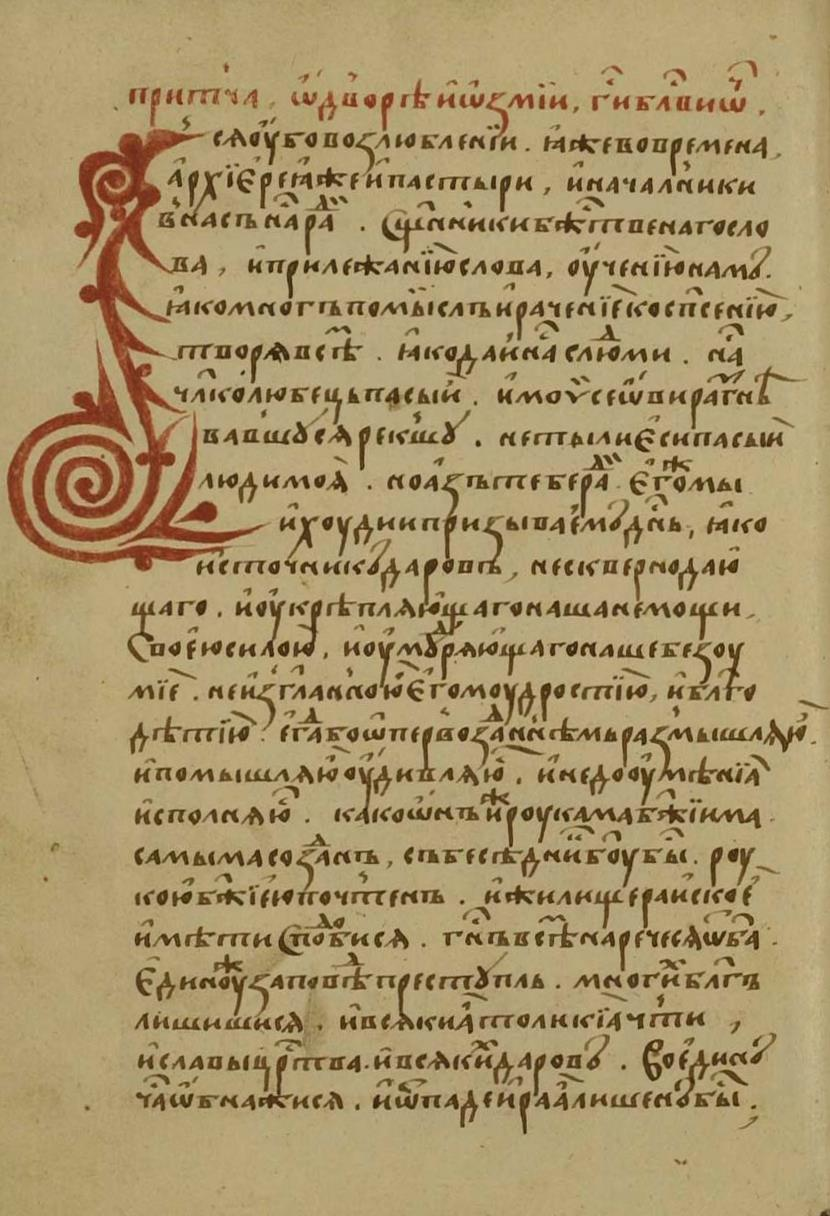 Рукопись № 142. (1651). Иоанна Златоустаго и других поучения, полууст. переходящий в скоропись, ХVІ века, в четверть, 290 л. Фонд 304.I. Главное собрание библиотеки Троице-Сергиевой лавры.